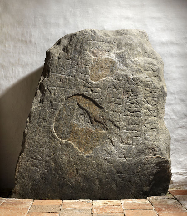 Foto: Nationalmuseet ved Roberto Fortuna